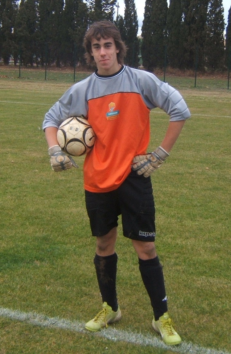 Jean-Pierre FY